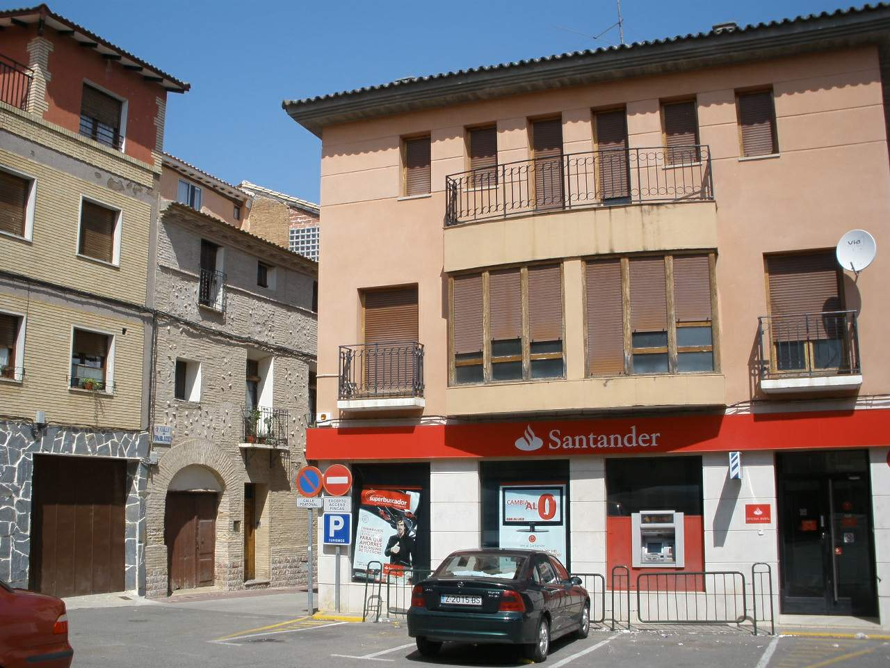 Pedrola (Zaragoza, Aragón, España)